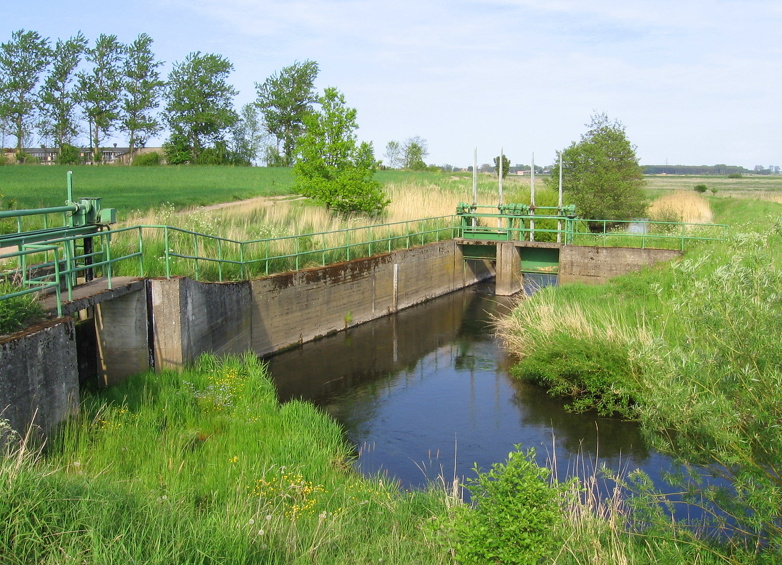 Śluzy Dębosznicy i Łużanki (woj. zachodniopomorskie)